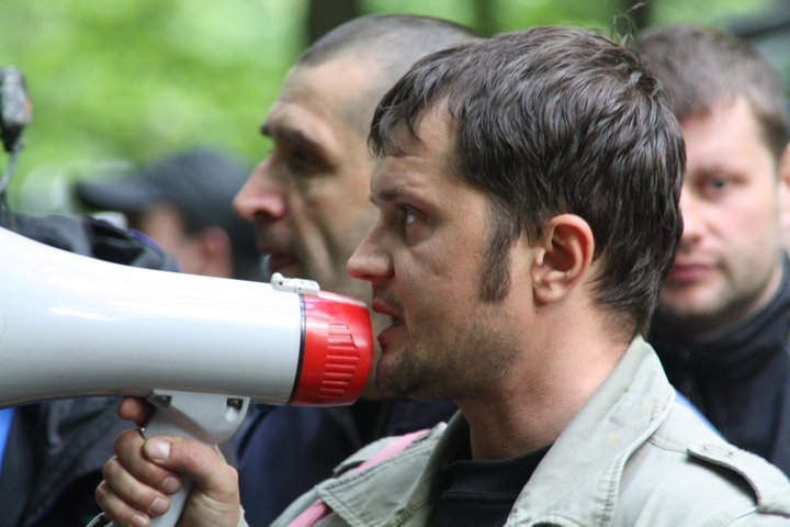 Rasty Petzalis, cel mai cunoscut organizator off-road din România